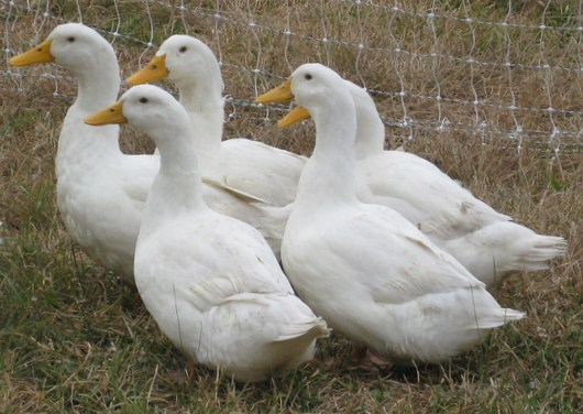 Pekin Ducks